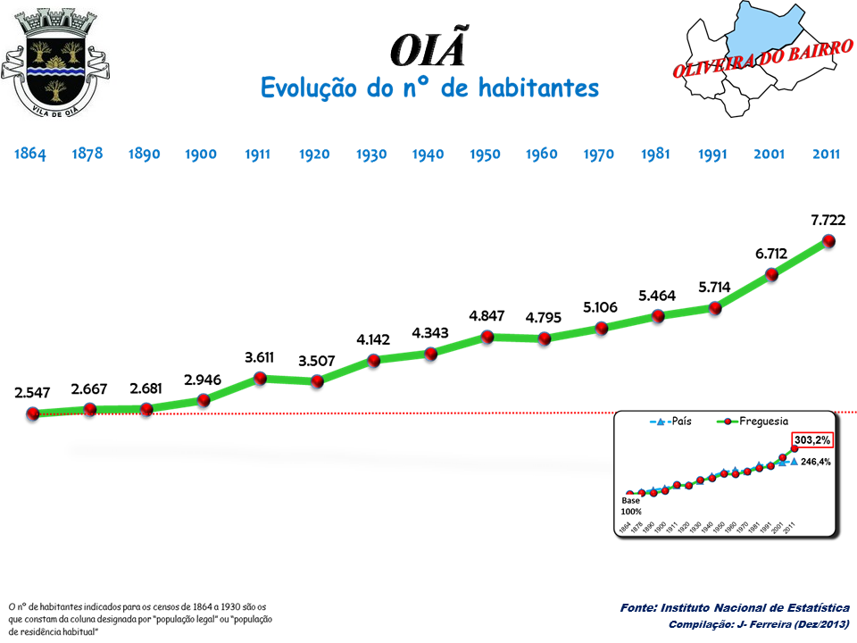 Evolução da População 1864 / 2011